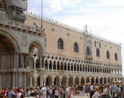 Alessandro Bon, Palazzo Ducale